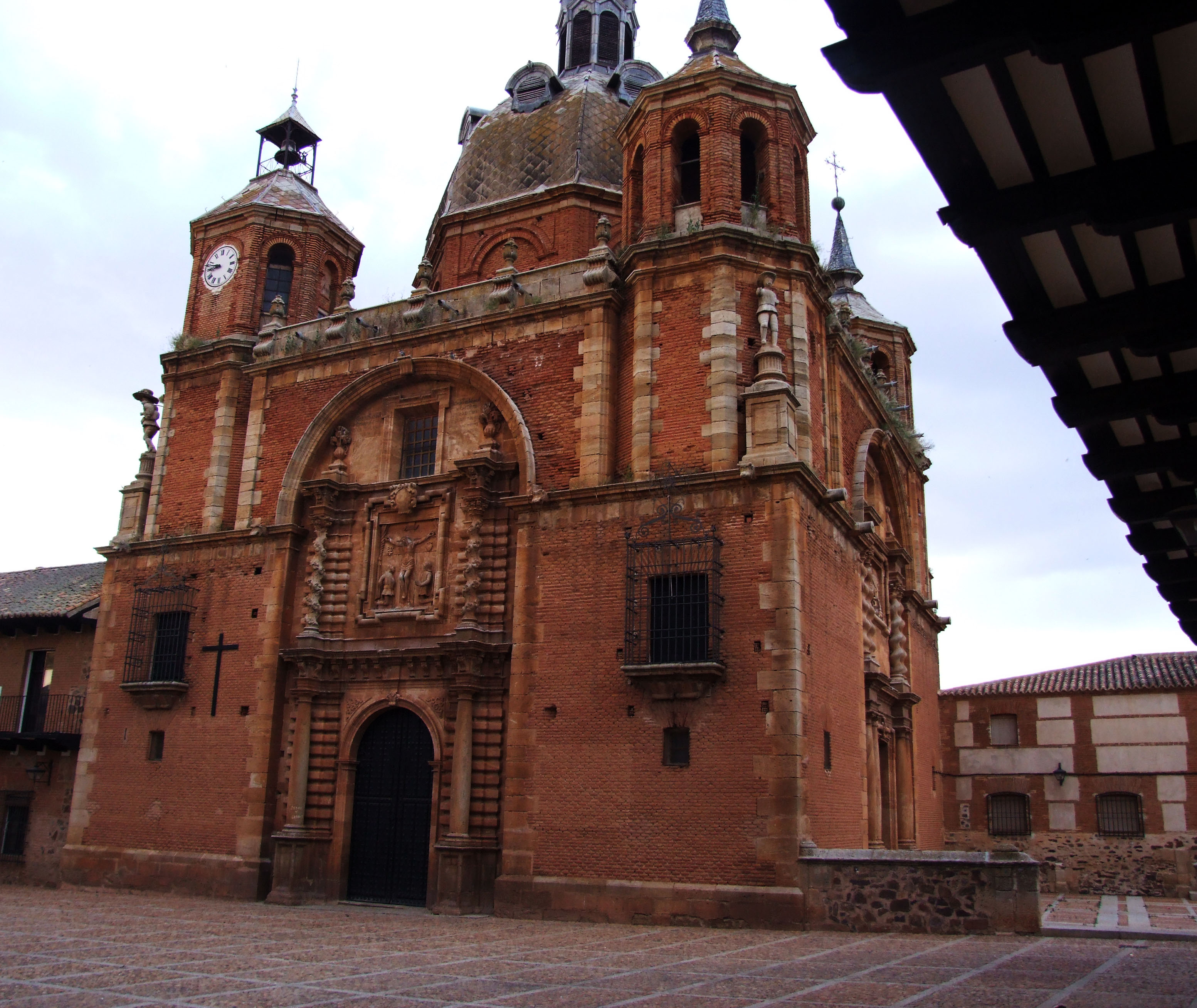 Iglesia parroquial de San Carlos del Valle